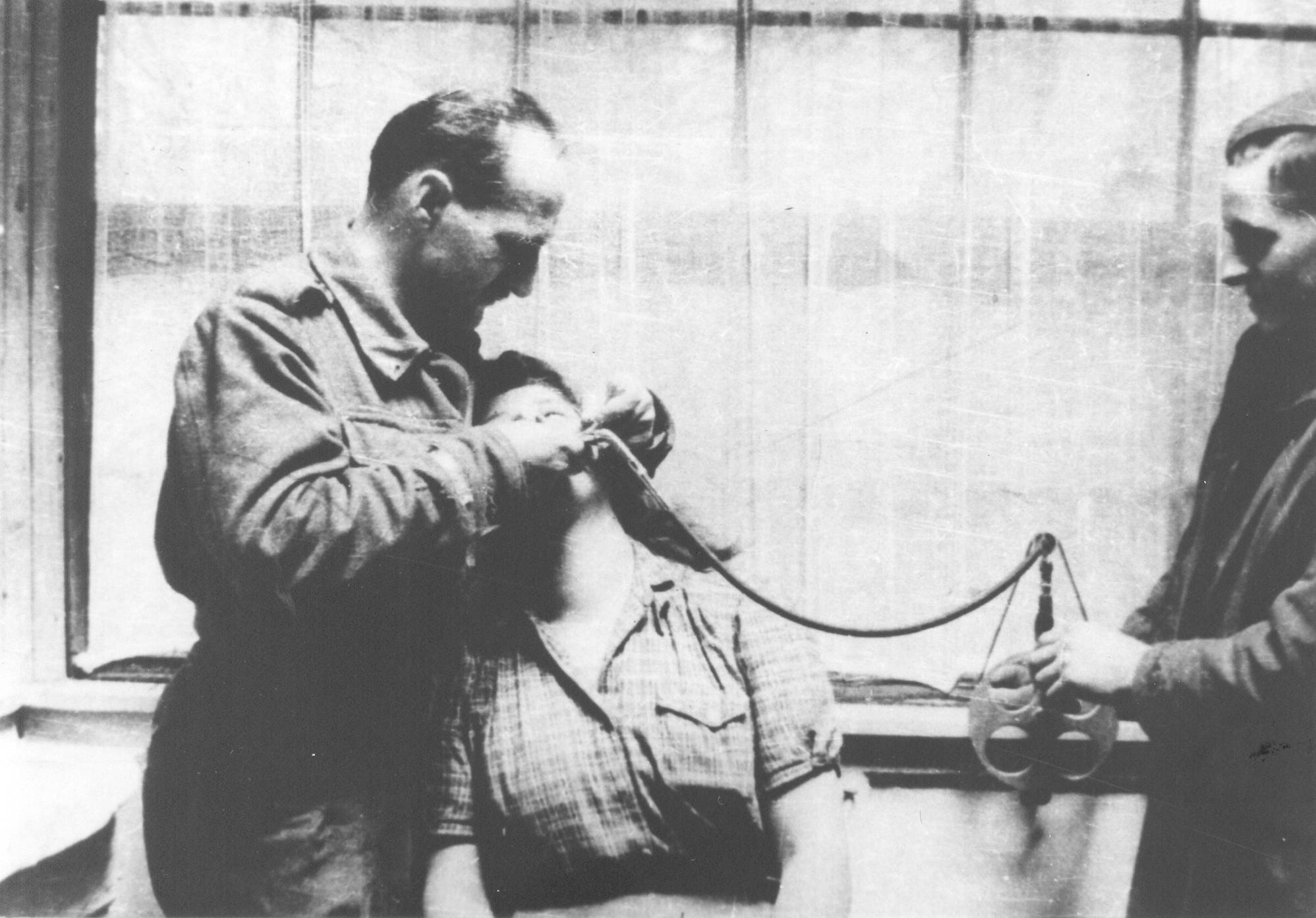 Partizanska stomatološka ambulanta v Sloveniji